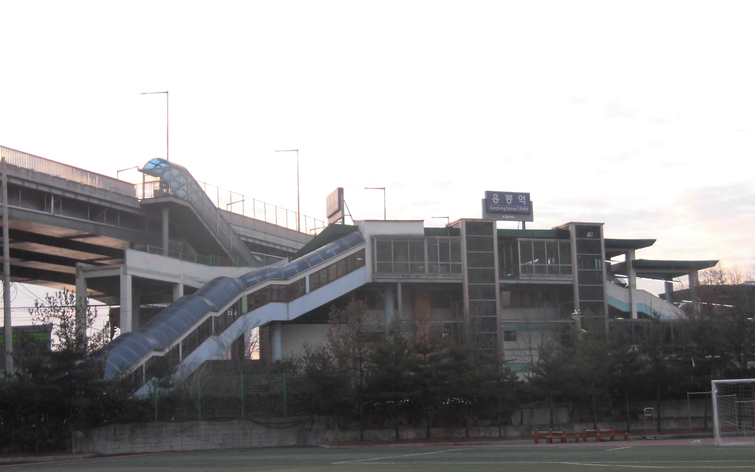 서울특별시 성동구에 있는 응봉역